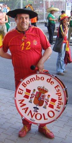 Manolo el del bombo en Kaiserslautern, durante la Copa Mundial de fútbol de 2006